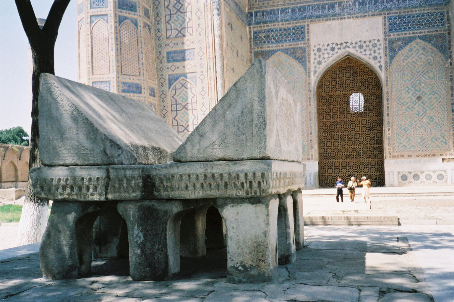 Le porte Coran dans la cour de la mosquée de Bibi-Khanym (épouse de Tamerlan) Photo prise en août 2001. M. Benoist